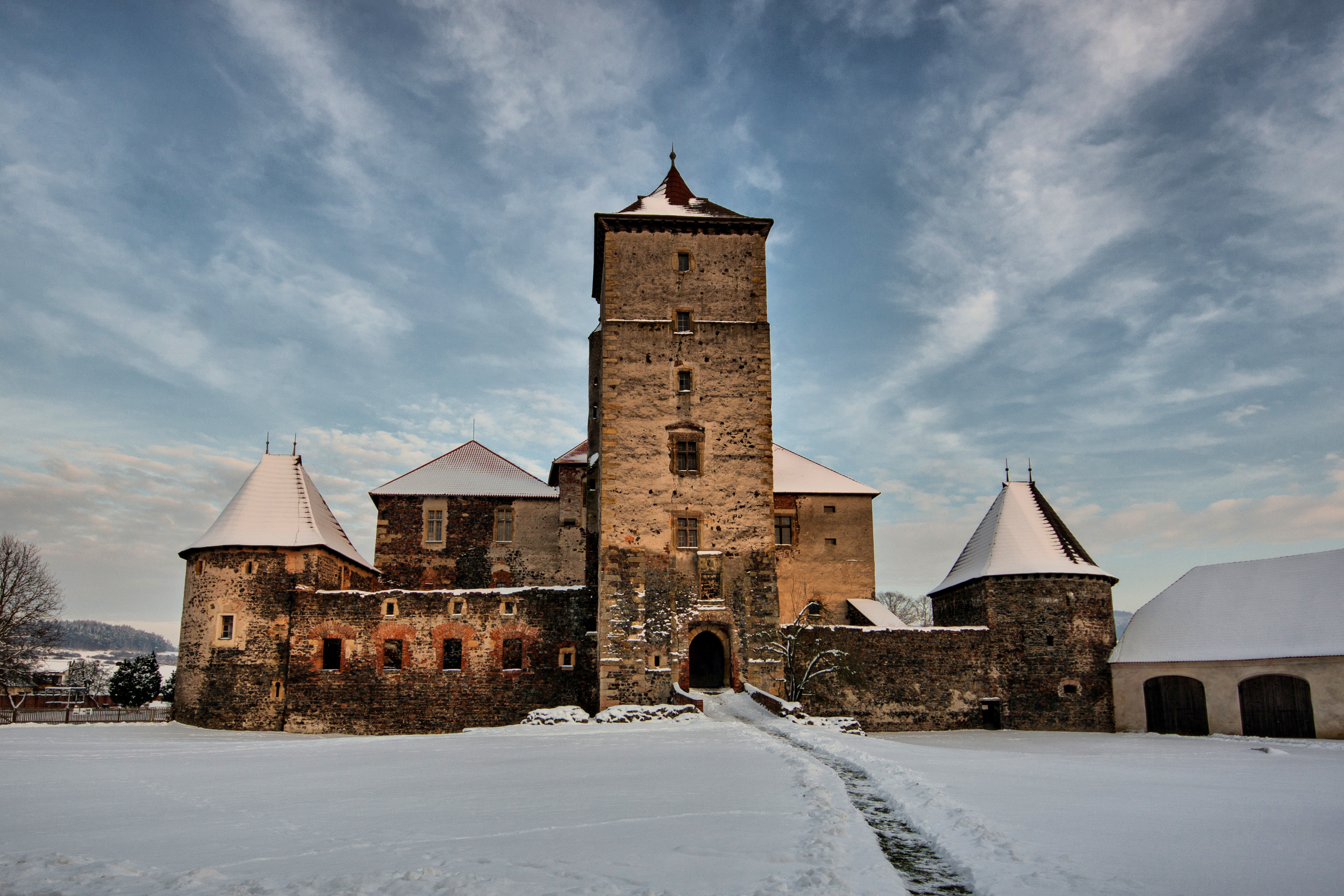 Hrad Švihov, Švihov.